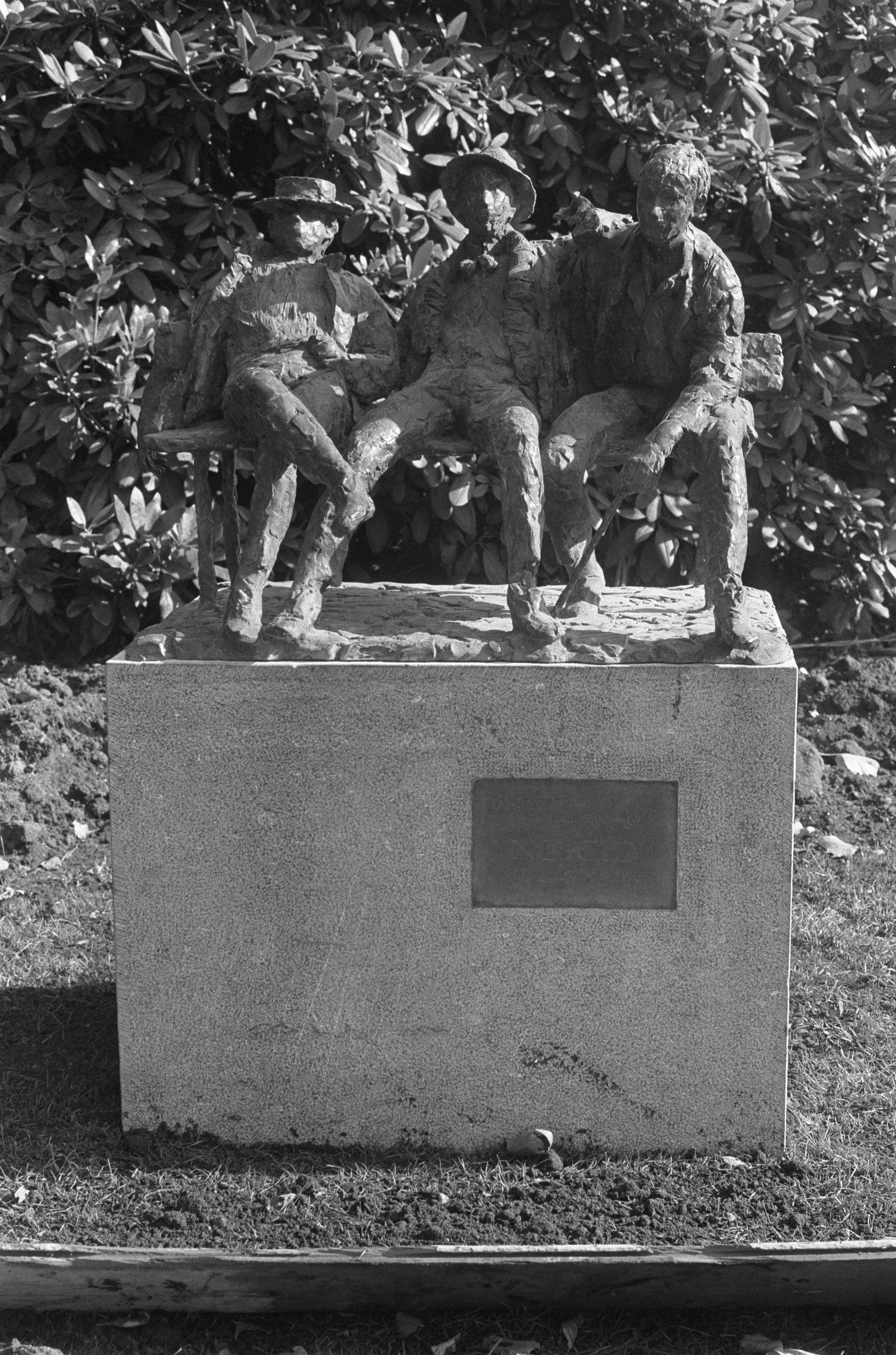 Collectie / Archief : Fotocollectie Anefo Reportage / Serie : [ onbekend ] Beschrijving : De Titaantjes Datum : 7 oktober 1971 Locatie : Amsterdam, Noord-Holland, Oosterpark Trefwoorden : beeldhouwwerken Persoonsnaam : Bayens, Hans Fotograaf : Mieremet, Rob / Anefo Auteursrechthebbende : Nationaal Archief Materiaalsoort : Negatief (zwart/wit) Nummer archiefinventaris : bekijk toegang 2.24.01.05 Bestanddeelnummer : 925-0200 Reacties Geplaatst door Amsterdammertje op 28 juni 2015 - 14:55: Beeldhouwwerk van beeldhouwer Hans Bayens naar Nescio's verhaal 'De Titaantjes', Bavink, Hoyer en Koekebakker. Ten opzichte van originele titel: Staat niet in de Jordaan, maar in het Oosterpark (in de Jordaan staat een ander beeld van Bayens),Ceescamel (talk) 11:01, 17 February 2020 (UTC)